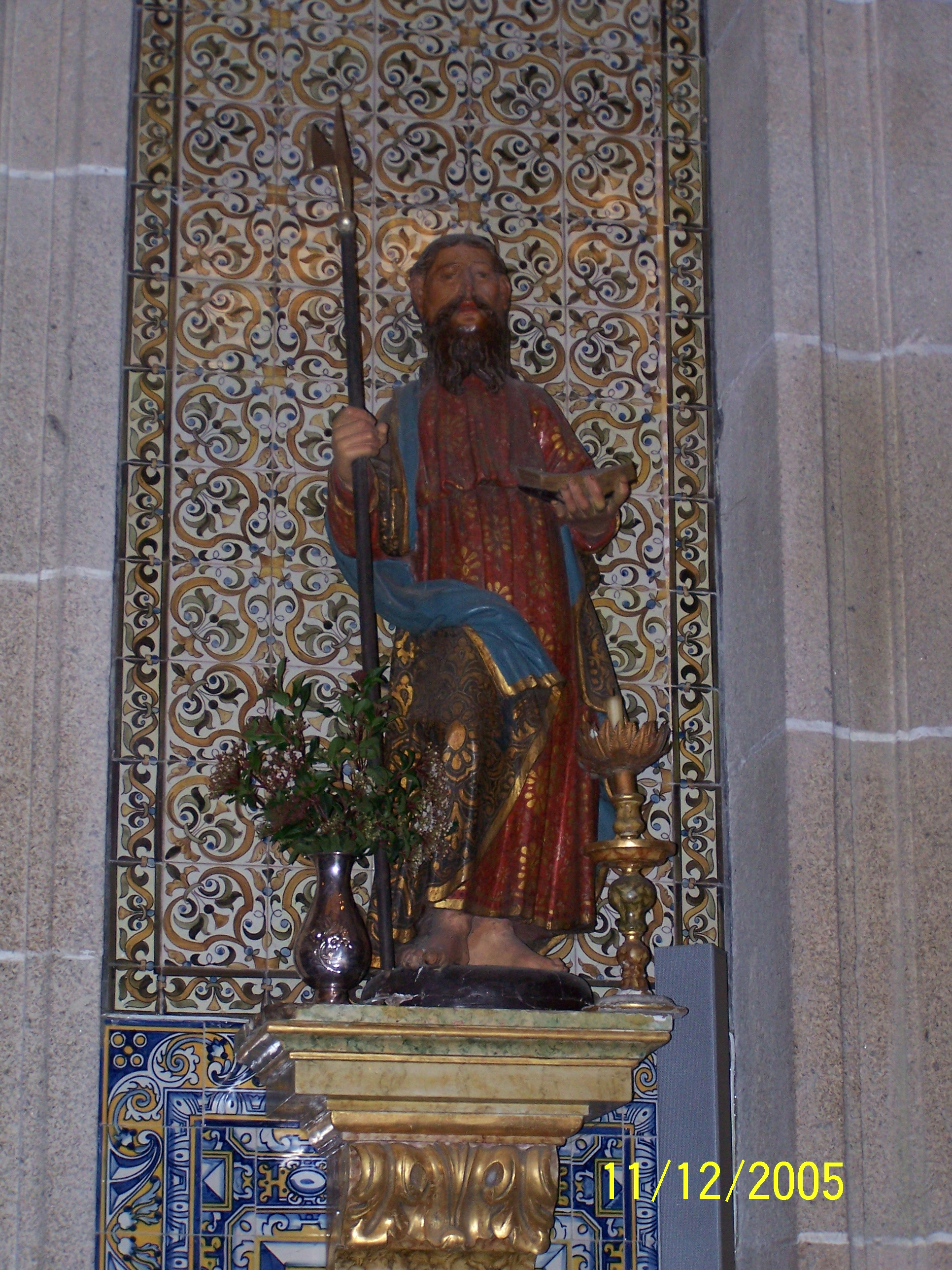 Imagem de são Judas Tadeu, da Igreja Paroquial da Junqueira.